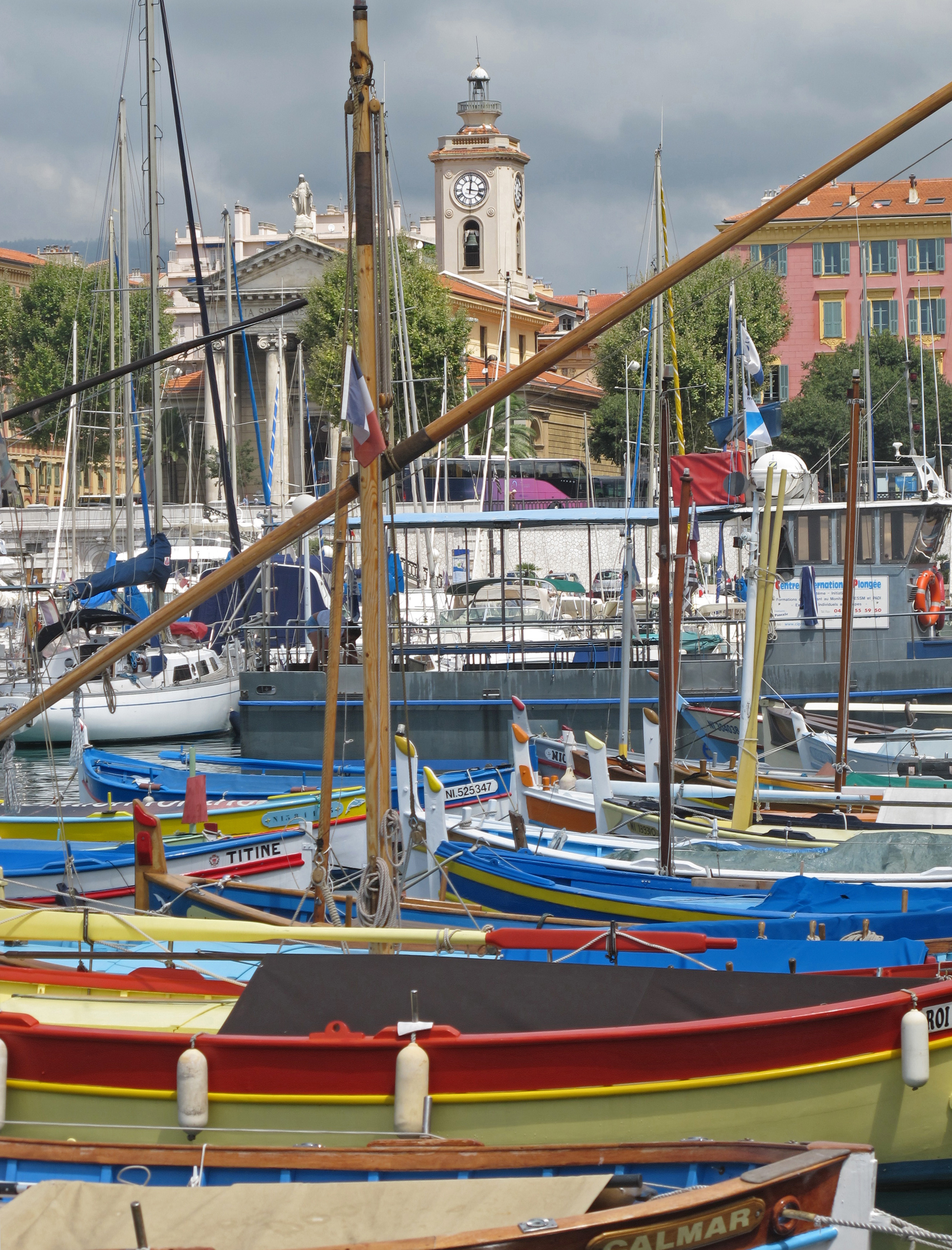 Le port de nice et Notre Dame de l'Immaculée Conception (du Port)